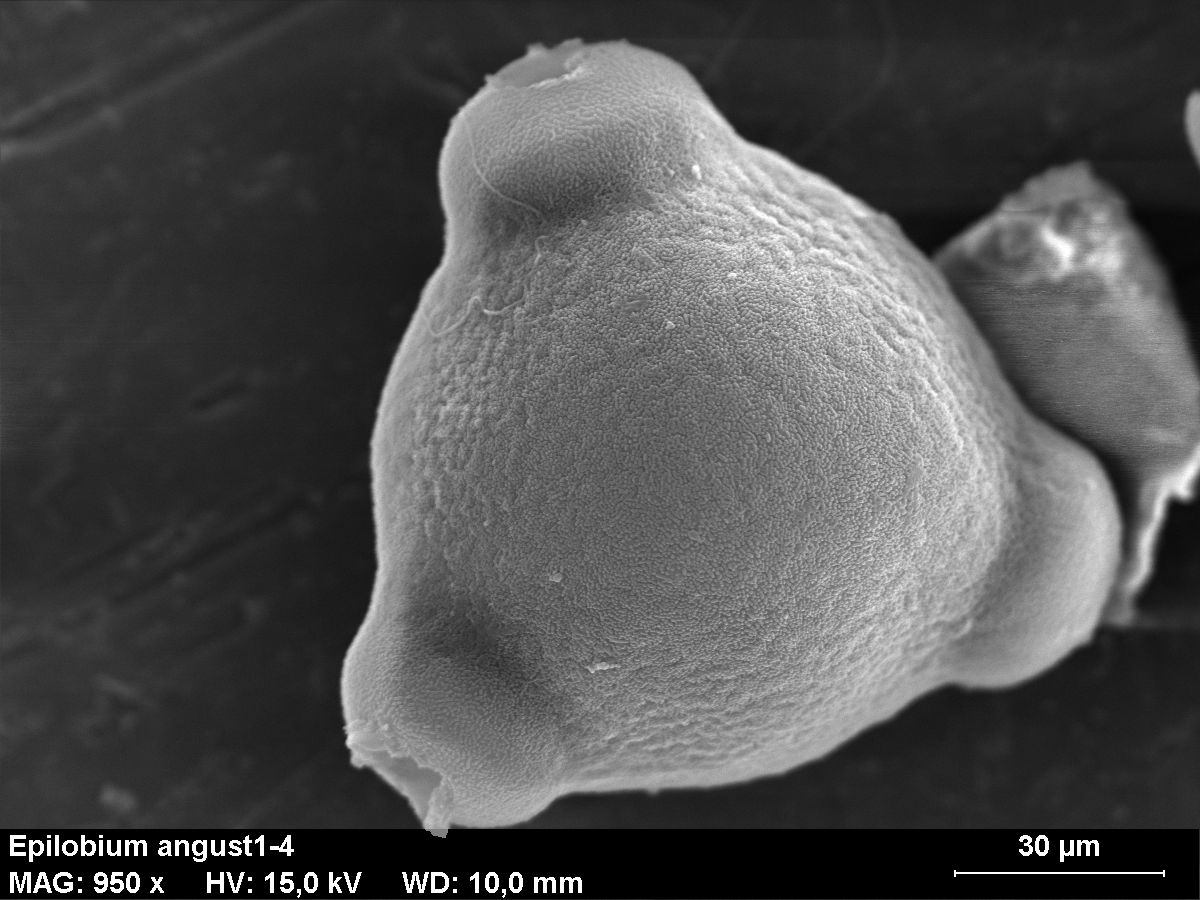 Epilobium angust - Pollen (Rasterelektronenmikroskop)